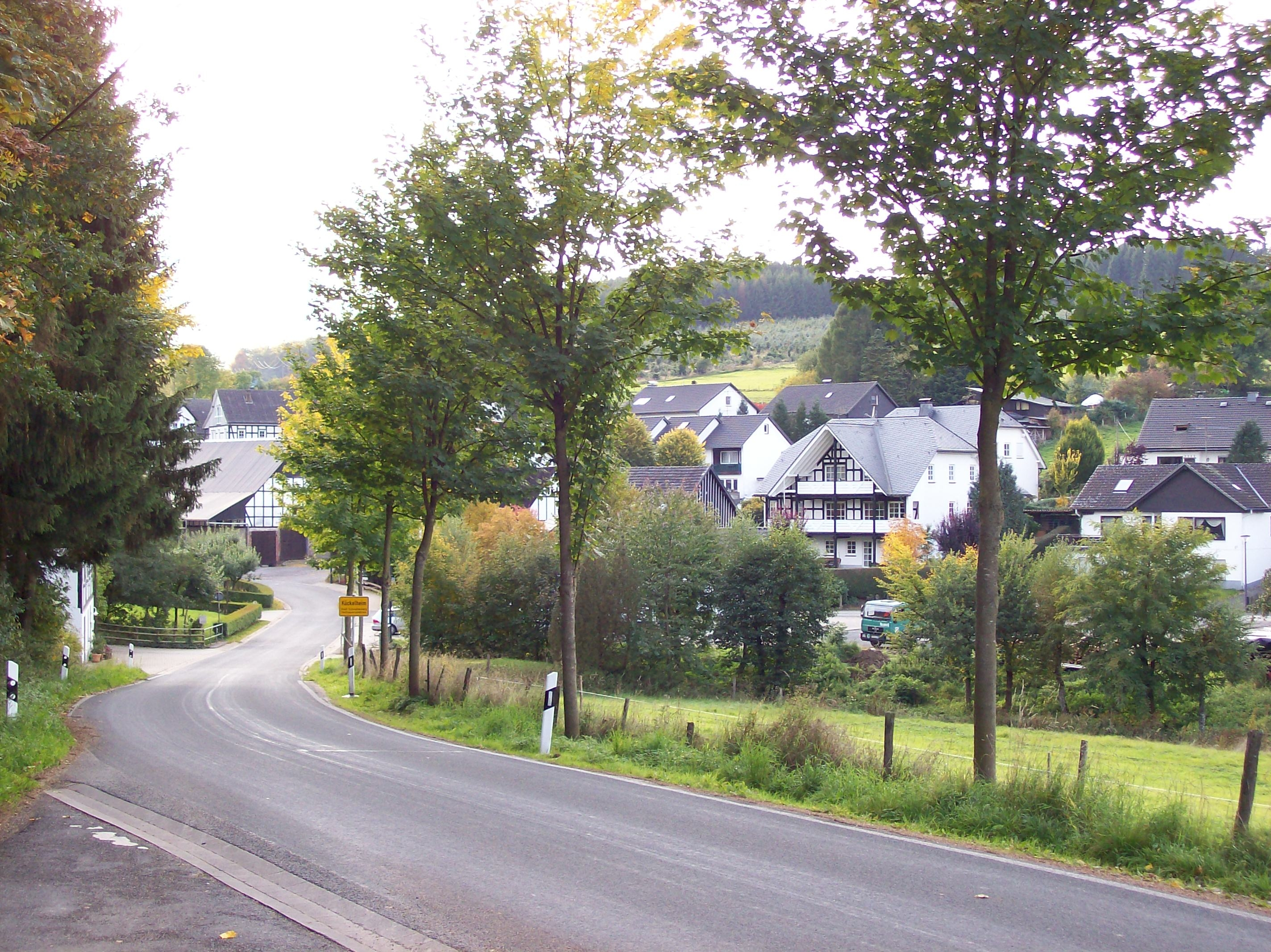 Schmallenberg-Kückelheim (Germany)